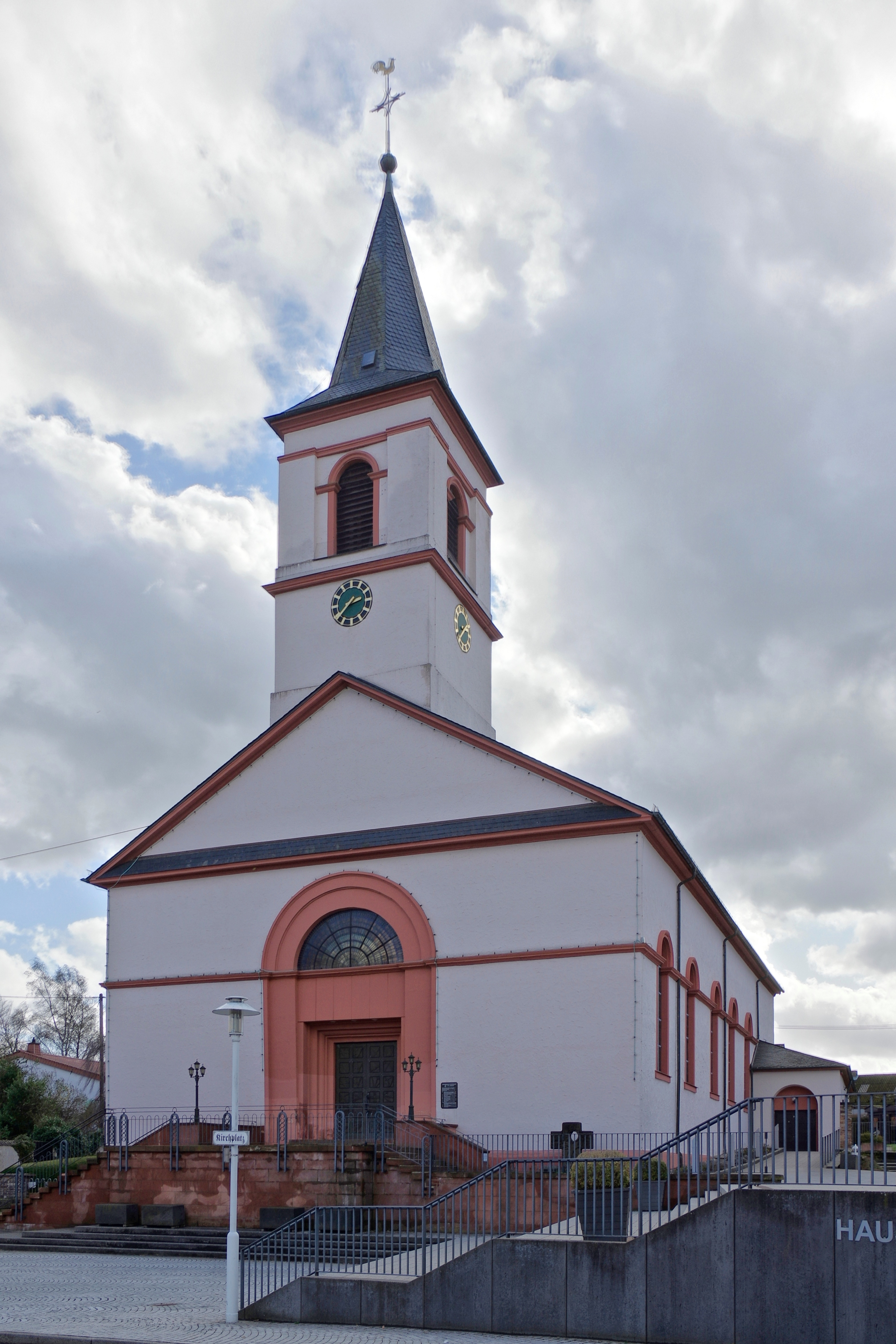 Weiskirchen, Trierer Straße, Kath. Kirche St. Jakobus. Die Jakobuskirche wurde in den Jahren 1830 bis 1833 im klassizistischen Stil errichtet und im Jahr 1952 nach Entwürfen von Architekt Franz Luy erweitert. Dabei wurde der ursprüngliche Chor mit dreiseitigem Schluss in einen Rechteckchor verändert und eine Sakramentskapelle erbaut. Die Saalkirche besitzt einen dachreiterartigen Turm mit quadratischem Grundriss. Die Westfassade besitzt ein Giebeldreieck und ein Rundbogenportal mit Lünettenfenster und Freitreppe. Ein umlaufendes Gurtgesims ist mit dem Portal verkröpft.